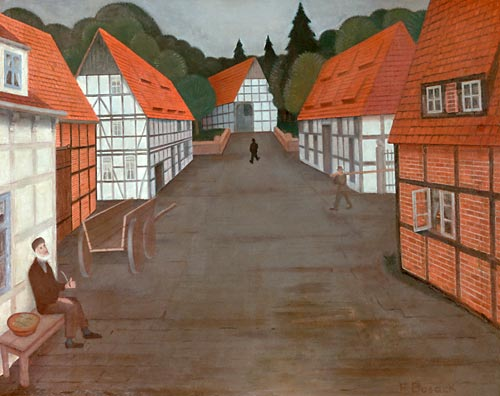 Abendliche Dorfstraße von Friedrich Busack, in den 1920er Jahren im Stil der Neuen Sachlichkeit gemalt, laut Hartmut Klauss, Geschäftsführer der Paint Gallyery: „... Gebäude und Figuren sind in einer altmeisterlichen Schichtenmalerei statisch ins Bild komponiert worden; das Licht, gleichmäßig verteilt, scheint aus einem imaginären Raum zu kommen. Diese Eigenarten führen zu einer ganz eigenen Bildmagie, die den besonderen Reiz dieser seltenen Gemälde aus dem schmalen Oeuvre von Friedrich Busack bestimmen.“ Das Gemälde „Abendliche Dorfstraße“ wurde 1925 im Kunstverein Hannover ausgestellt ...